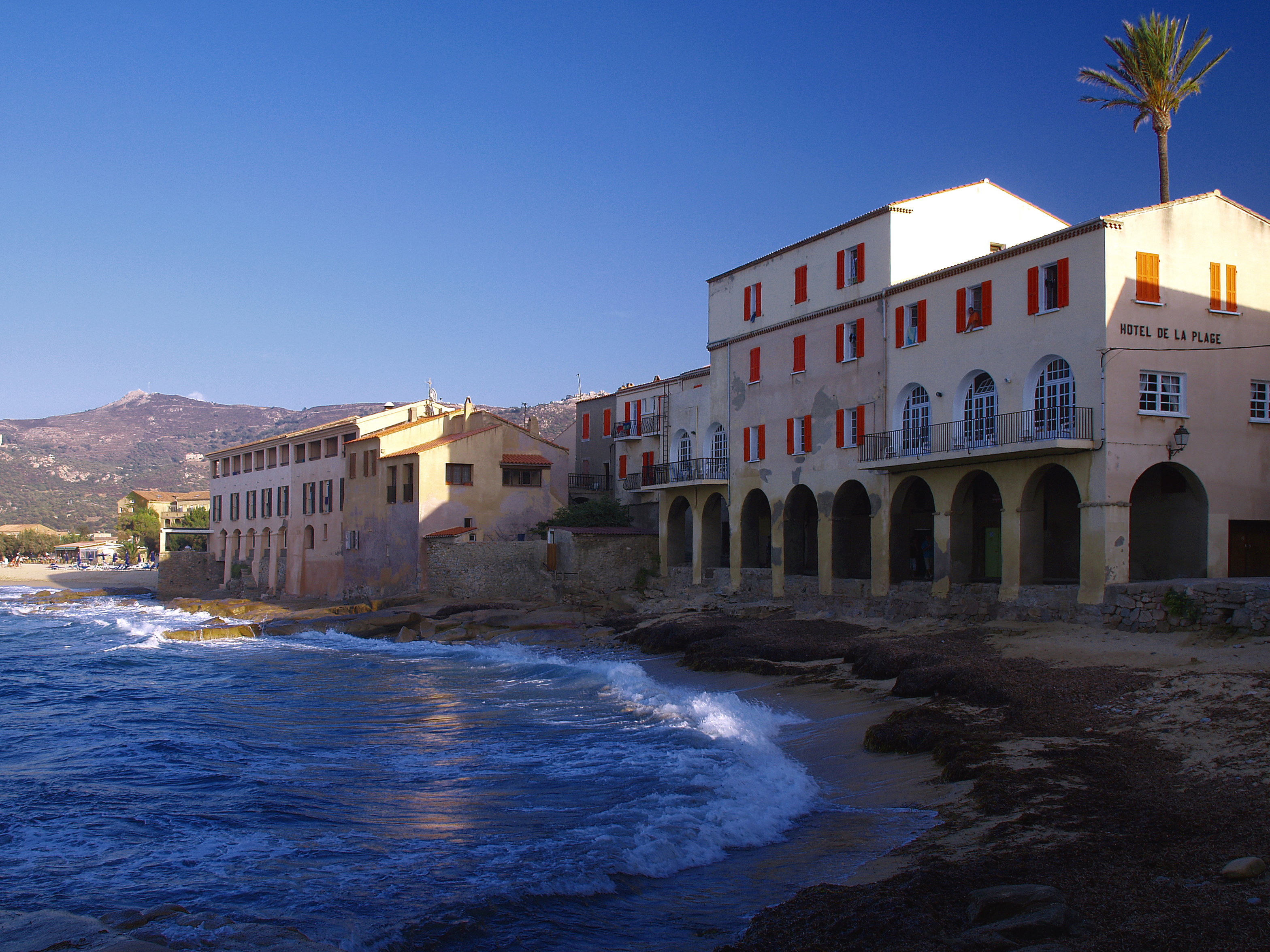 Algajola - Etablissements du bord de mer